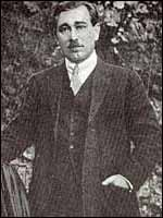 Fethi Okyar